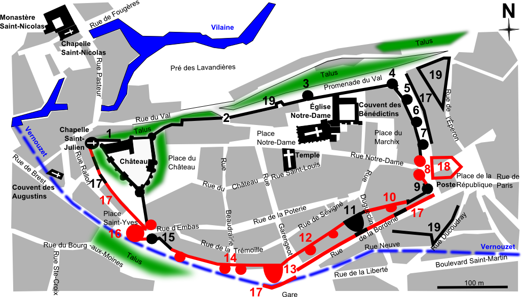 1 : Chapelle Saint-Julien (extrémité Ouest du promontoire) et Fausse-Braie (au Nord) 2 : Poterne Saint-Pierre (ou du Val, ou Bel-Hôte ou encore Poterne aux Chevaux) 3 : Tour aux Chèvres 4 : Tour Rompue ou Tour de la Fresnaye 5 : Tour du Géomètre 6 : Tour Doré 7 : Tour des Prisonniers (Inscrit MH) 8 : Porte d'En Haut (matérialisée entre la Rue Notre-Dame et la Place de la République) 9 : Tour de la Bridole ou Tour du Coin ou Tour du Marché (Inscrit MH) 10: Demi-tours 11: Tour des Claviers 12: Tour de Sévigné 13: Porte Gâtesel (dont la grosse Tour Gâtesel située à l'Ouest de la Rue Garengeot) 14: Tour de Beaucé ou du Fer à Cheval 15: Porte d'Embas (Tour Sud) (Inscrit MH) 15: Porte d'Embas (Tour Nord) 16: Barbacane (matérialisée sur la Place Saint-Yves) 17: Contrescarpe (quelques éléments subsistent autour du Parking Rue Rallon) 18: Barbacane 19: Éperon